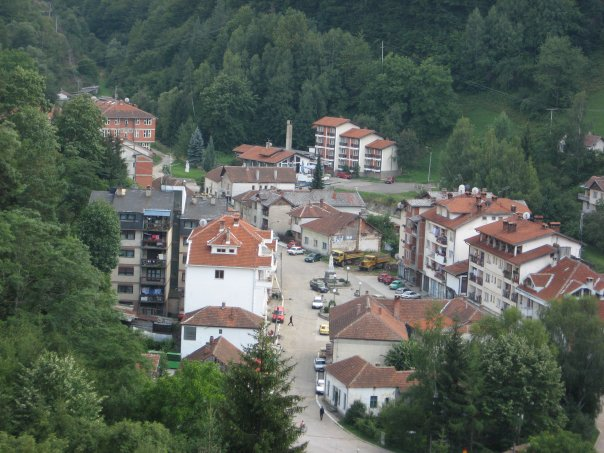 Crna Trava